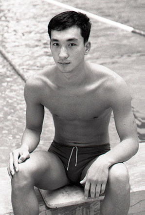 Tadaharu Goto, 1964 Olympics